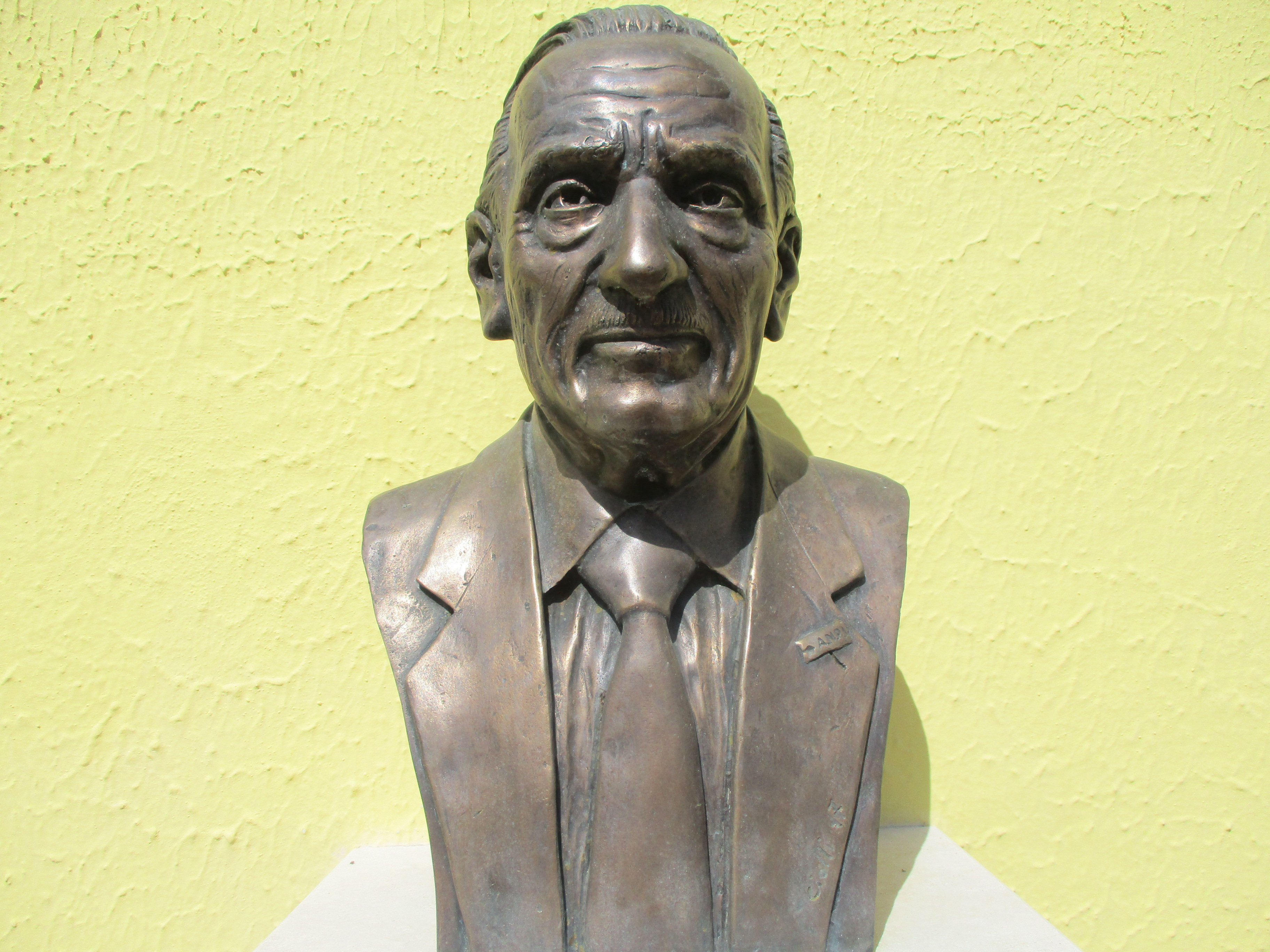 Busto di Mario Spallone a Lecce nei Marsi